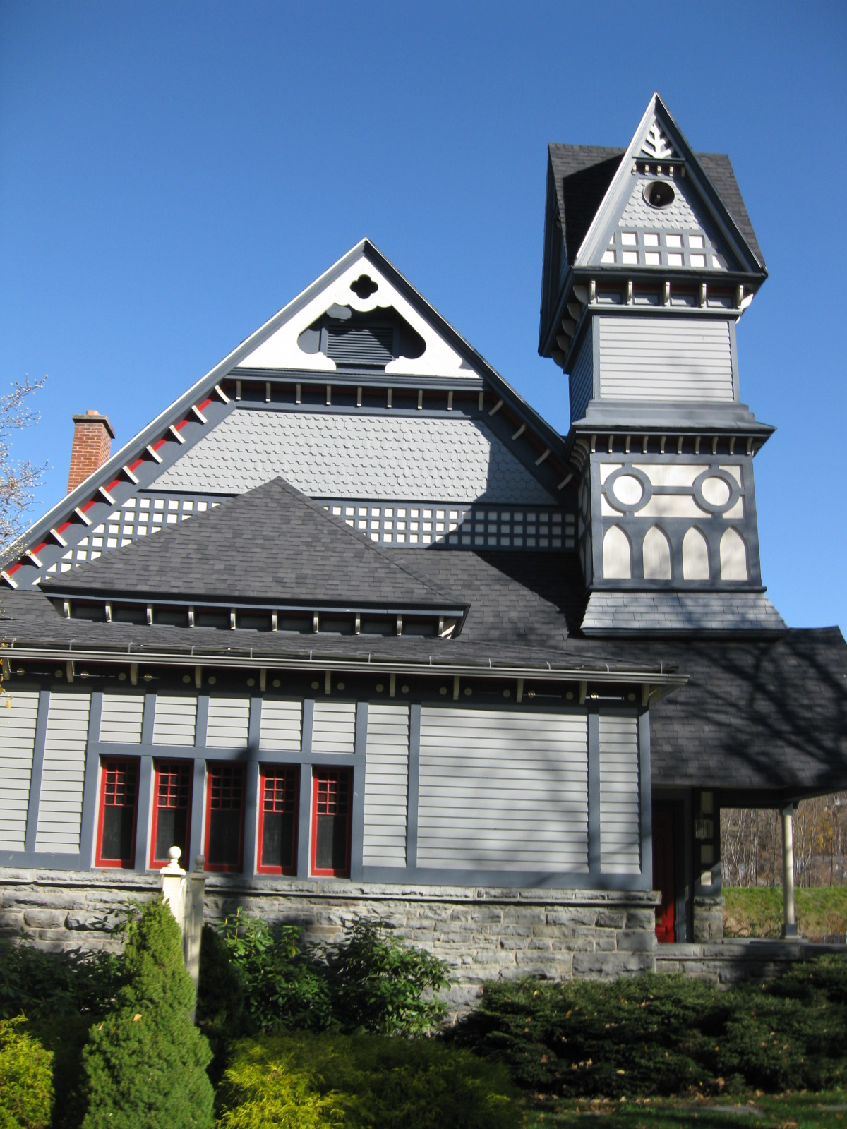 Hawley, Pennsylvania